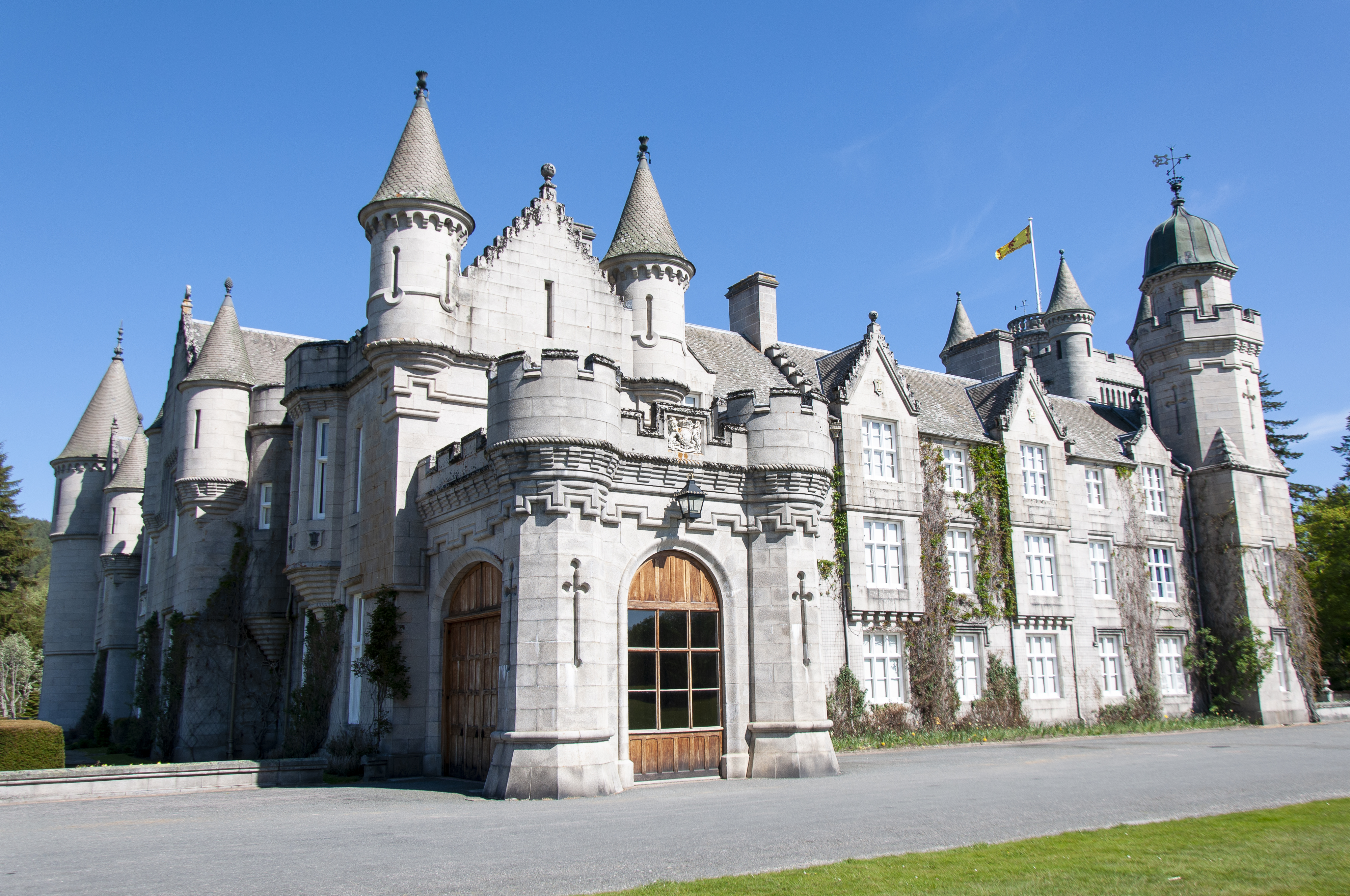 Balmoral Castle